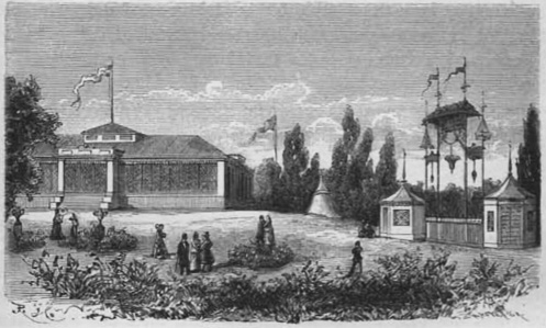 Norra Tivoli, vid Norrtullsgatan Bild efter ett inträdeskort